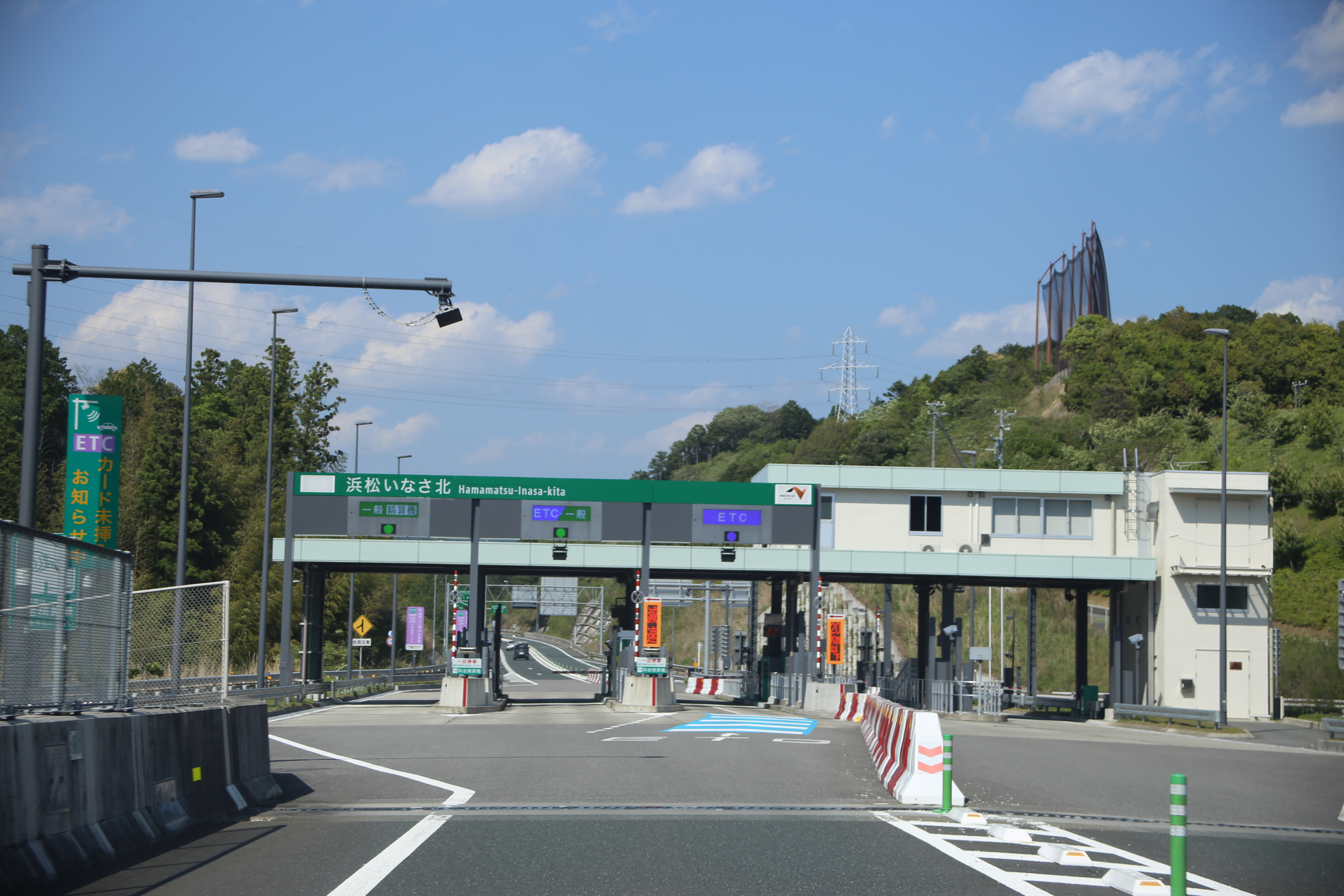 浜松市北区引佐町東黒田の三遠南信自動車道浜松いなさ北料金所を飯田方面（下り）本線上において撮影